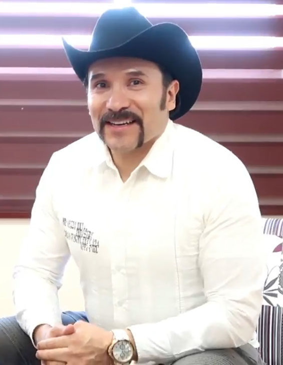 Luis Manuel Avila durante una entrevista